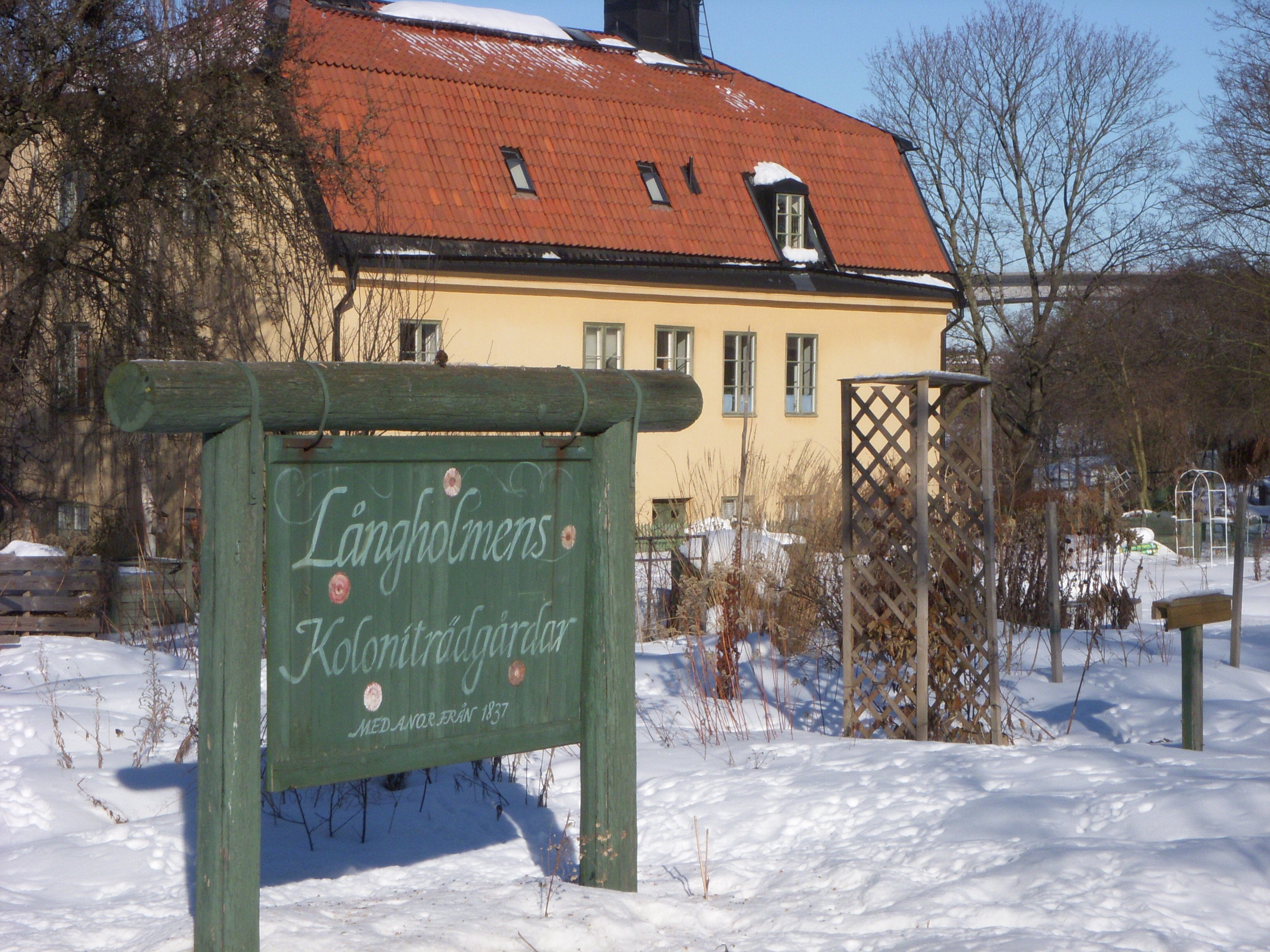 Långholmens koloniträdgårdar på Långholmen, Stockholm